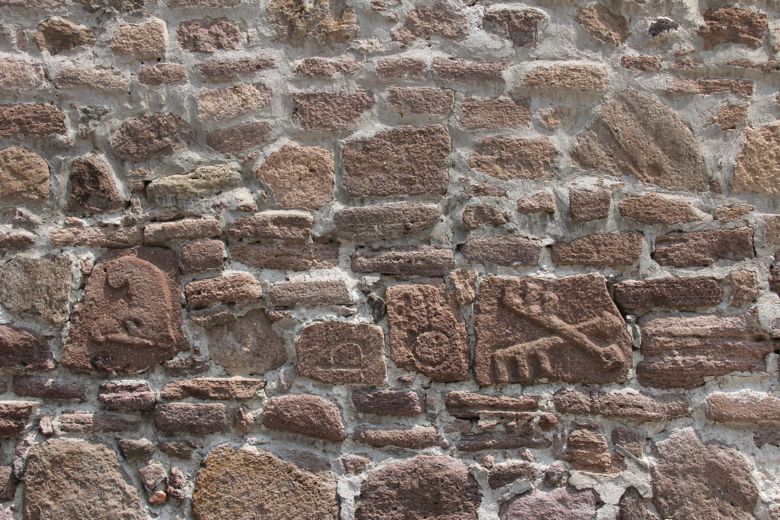 Jeroglifos en la fachada de la iglesia de Teoloyucan.